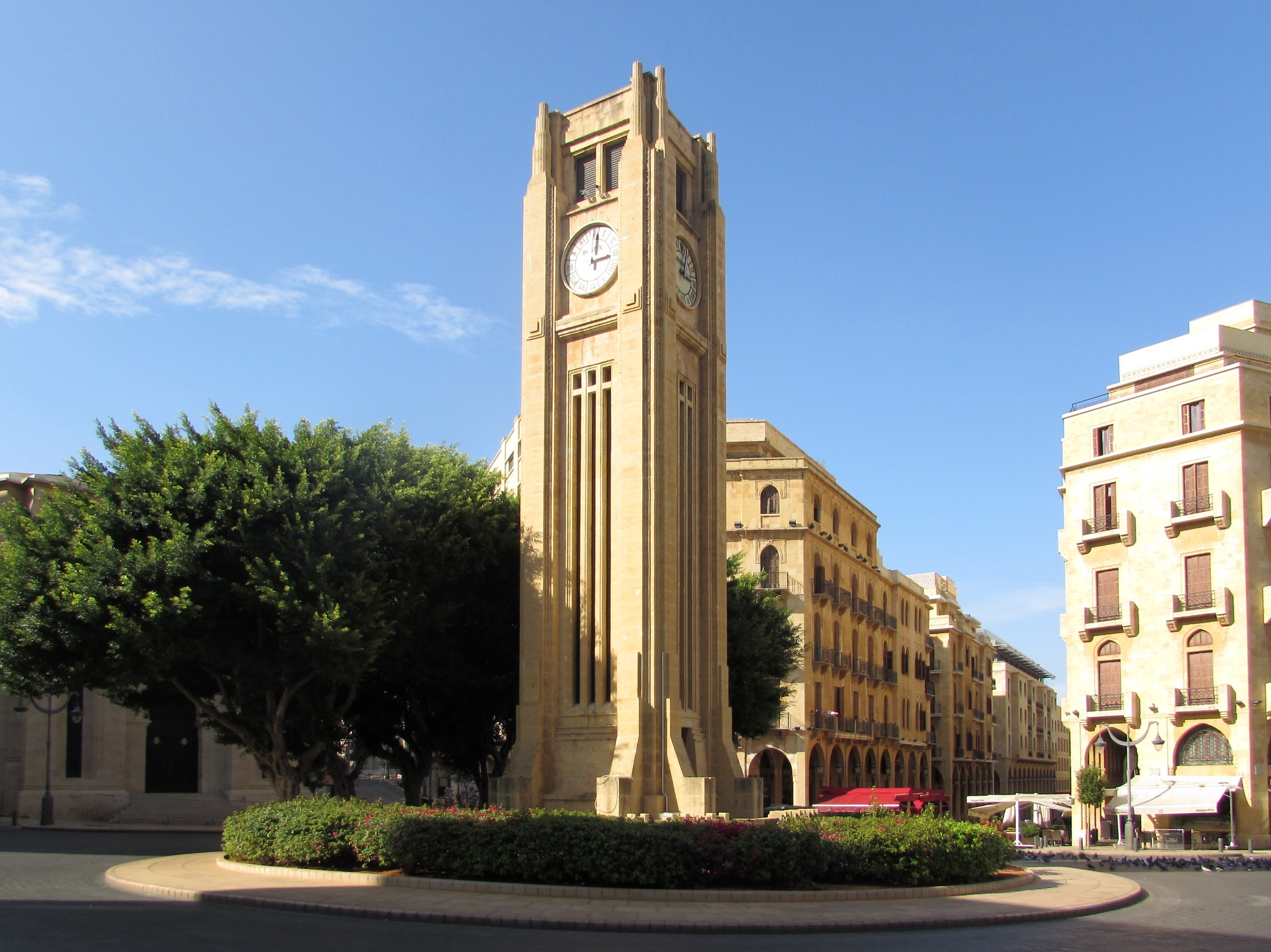 nejmeh-platz oder place de l’etoilein beirut